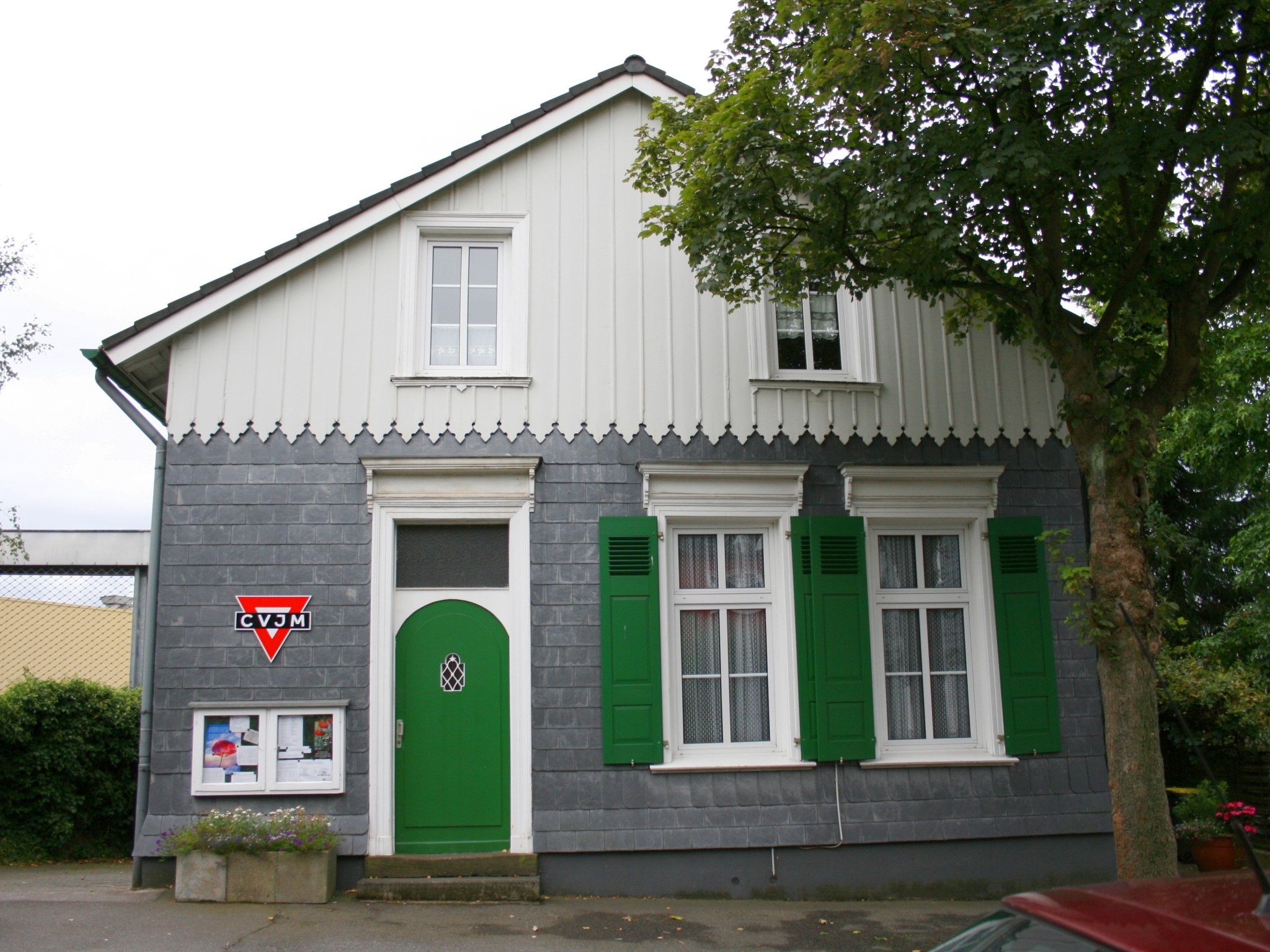 Wuppertal-Ronsdorf, Innenstadt